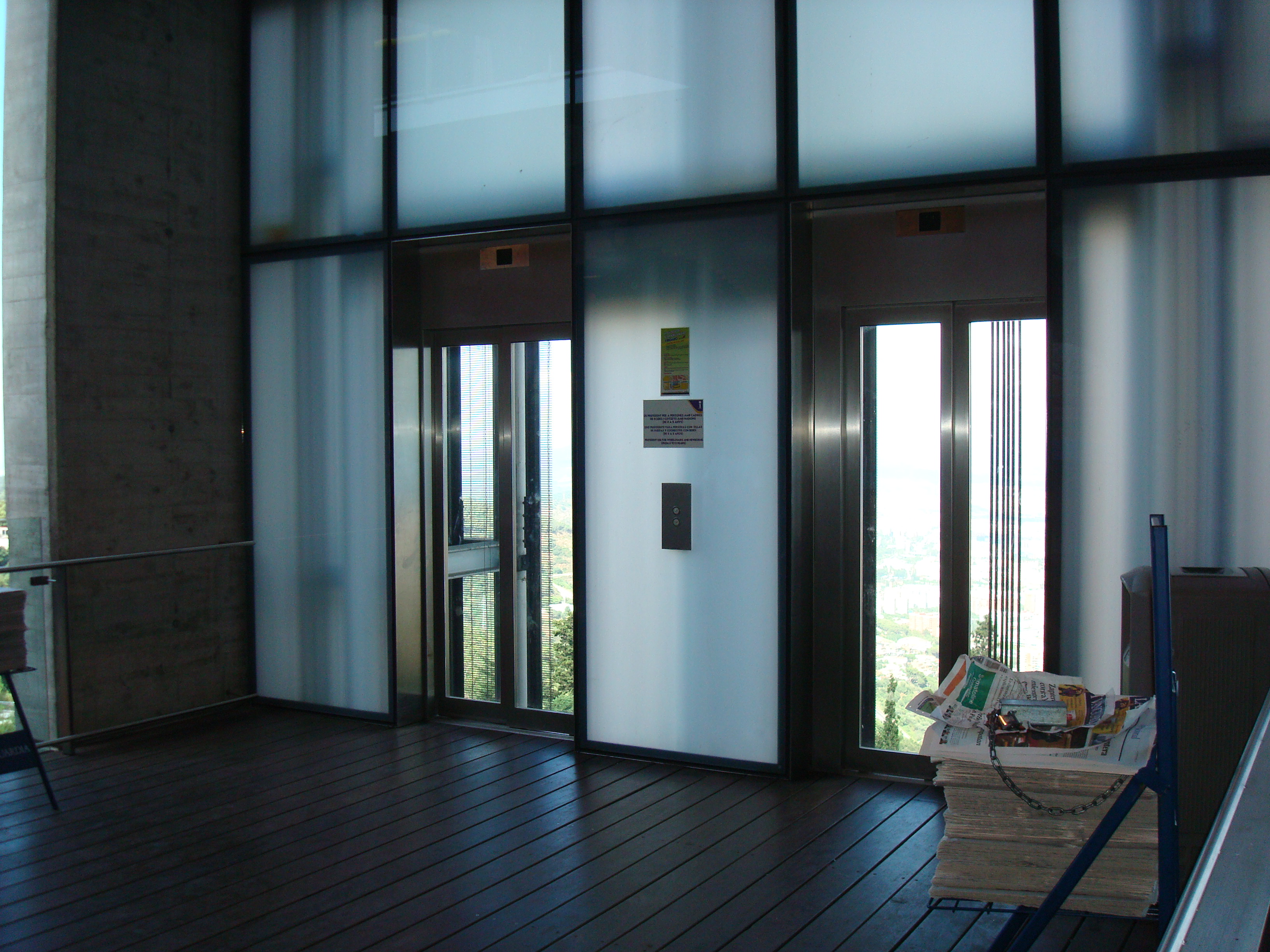 Accessibilitat (ascensors) del Parc d'Atraccions del Tibidabo